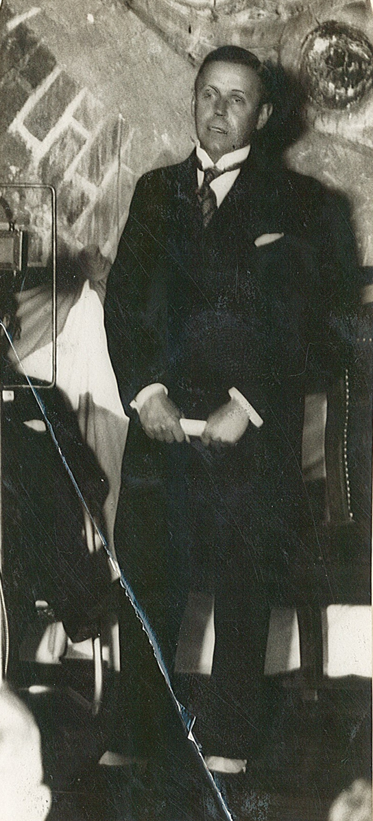 Henrik Nissen d.y. Ukjent fotograf, 1931. Fra Byhistorisk samling hos Oslo Museum.